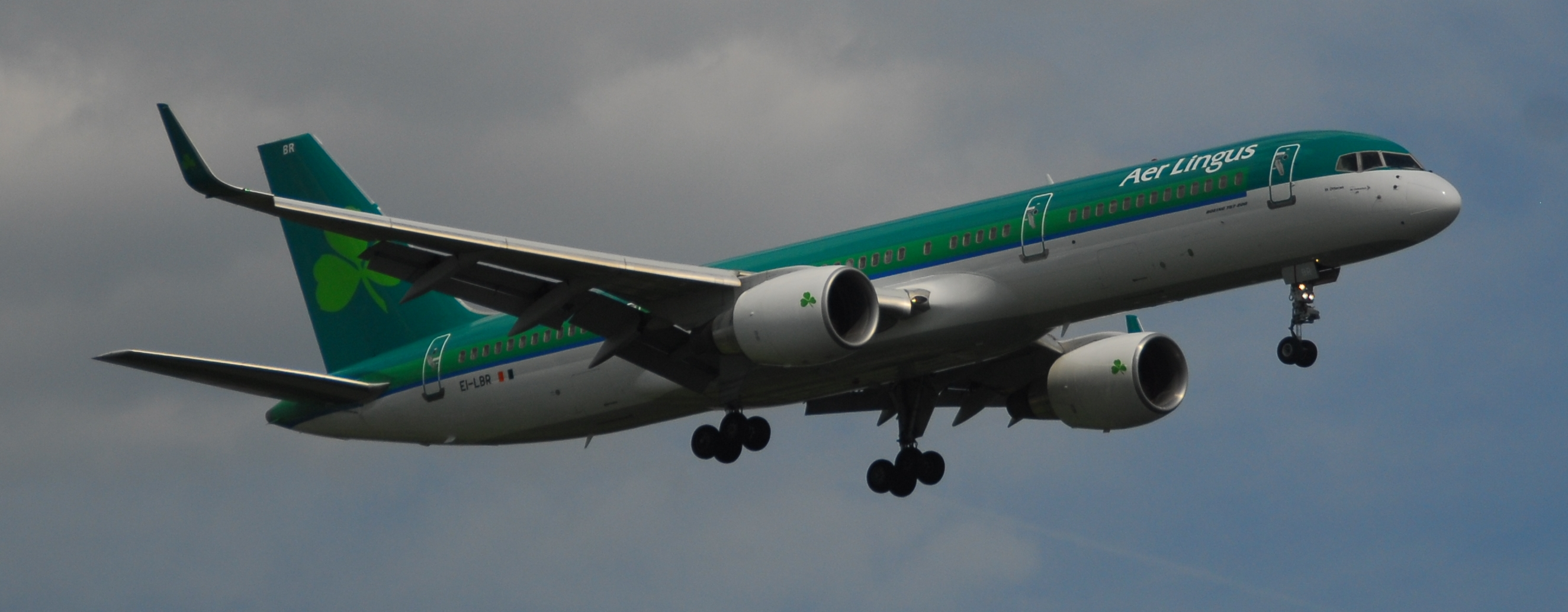 DSC_0044 cropped